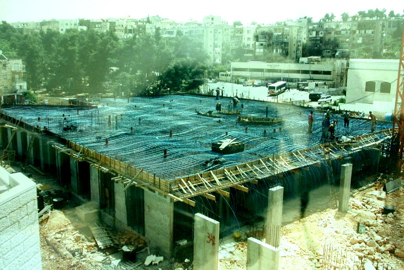 from [ uploaded by דוד שטרן the manager of the site. תקרת מעבר דרוכה - גבעת קומונה מתוך אתר י.ד.ע. מהנדסים בע"מ - התמונה הועלתה לוויקיפדיה על ידי דוד שטרן - מנהל אתר